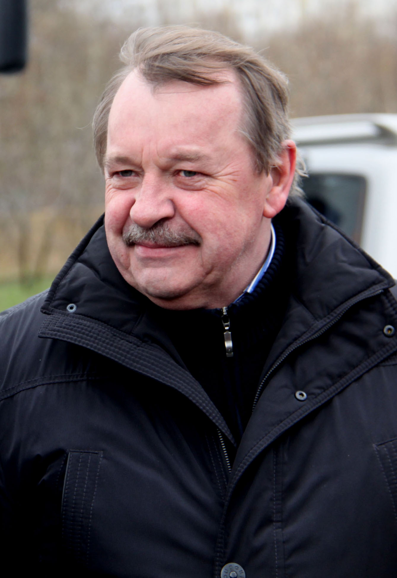 Префект Южного административного округа города Москвы Алексей Валентинович Челышев